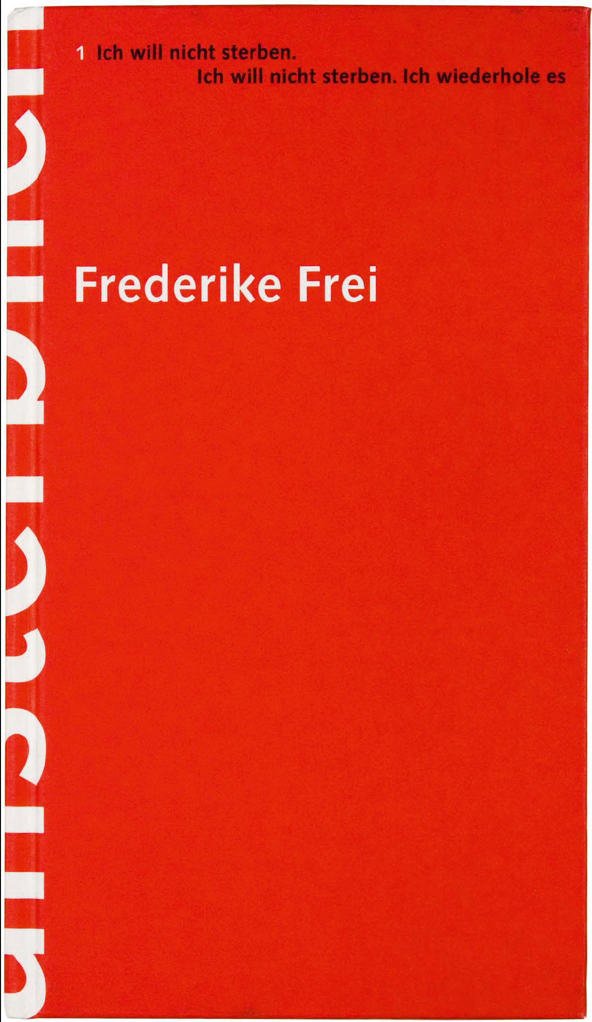 Fredericke Frei: unsterblich. Bucheinband, Verlag Dölling und Galitz Hamburg, Buchgestaltung: Groothuis+Malsy, Bremen, 1997